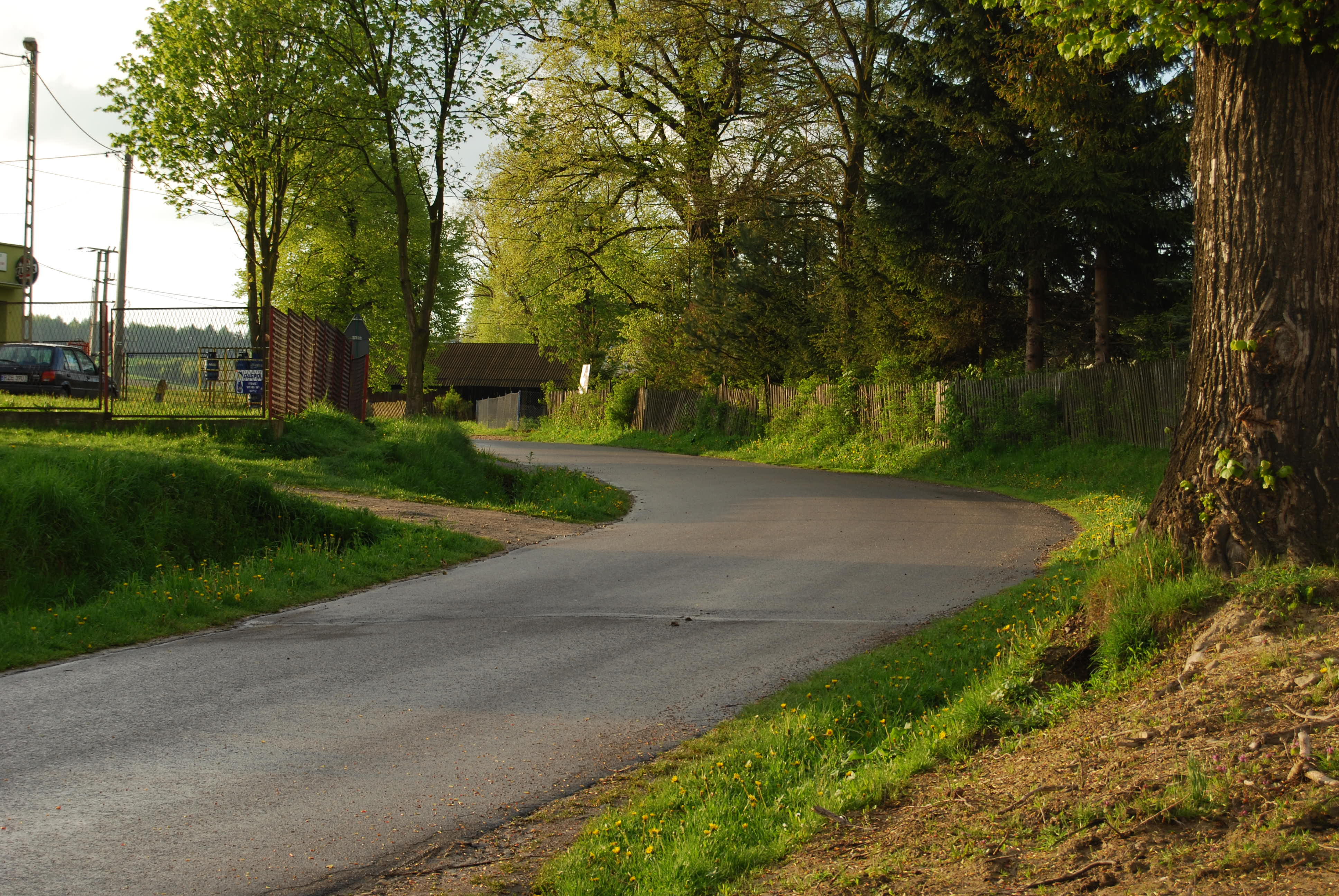 Laskówka, sklep